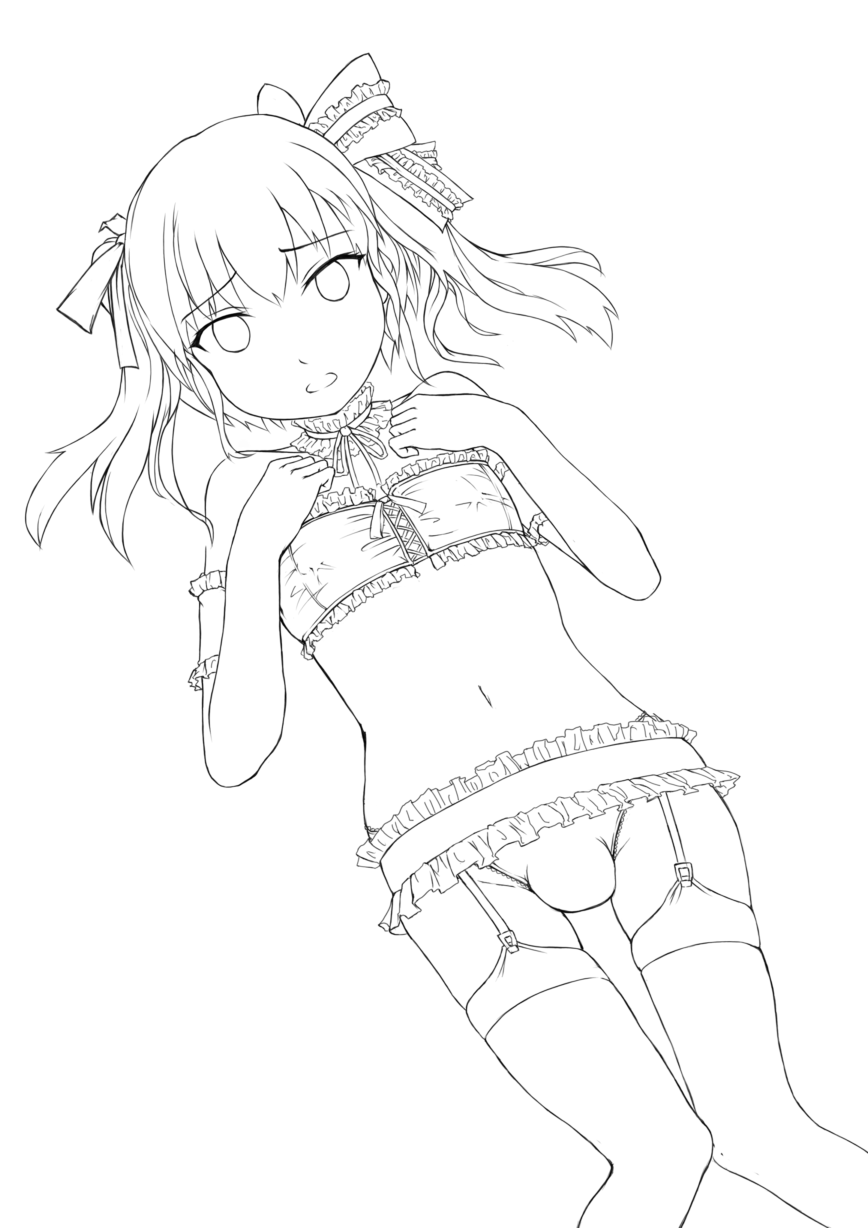 吊帶襪偽娘示意圖。